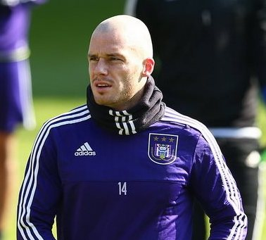 Брем Нейтінк - футболіст ФК Андерлехта